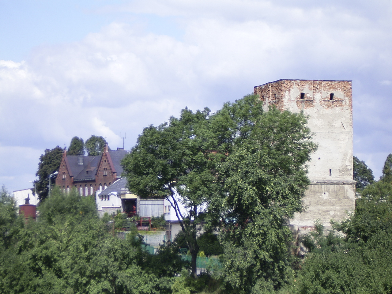 Die Wasserkunst in Zülz